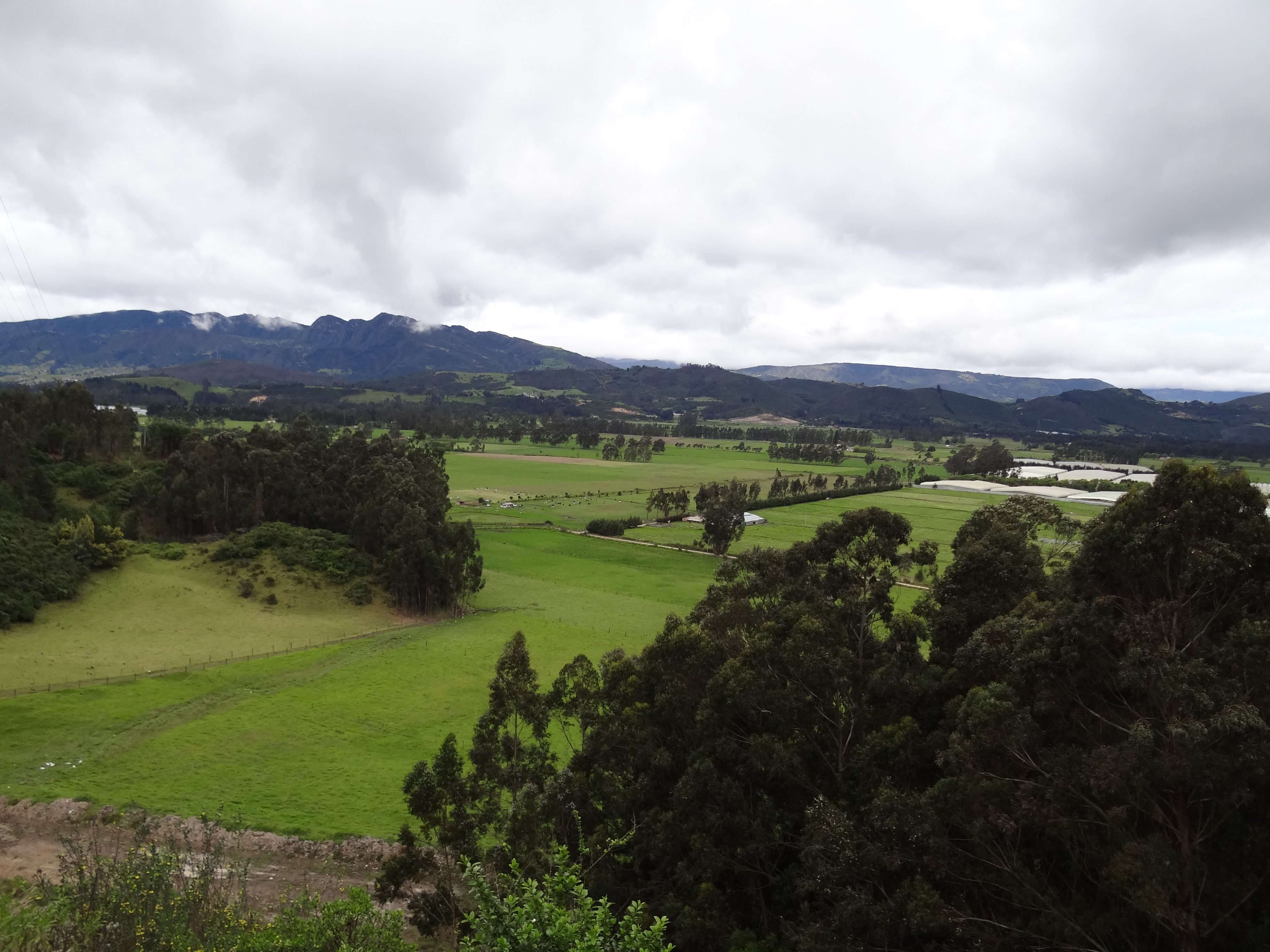 Paraje rural del municipio de Nemocón, Cundinamarca, Colombia